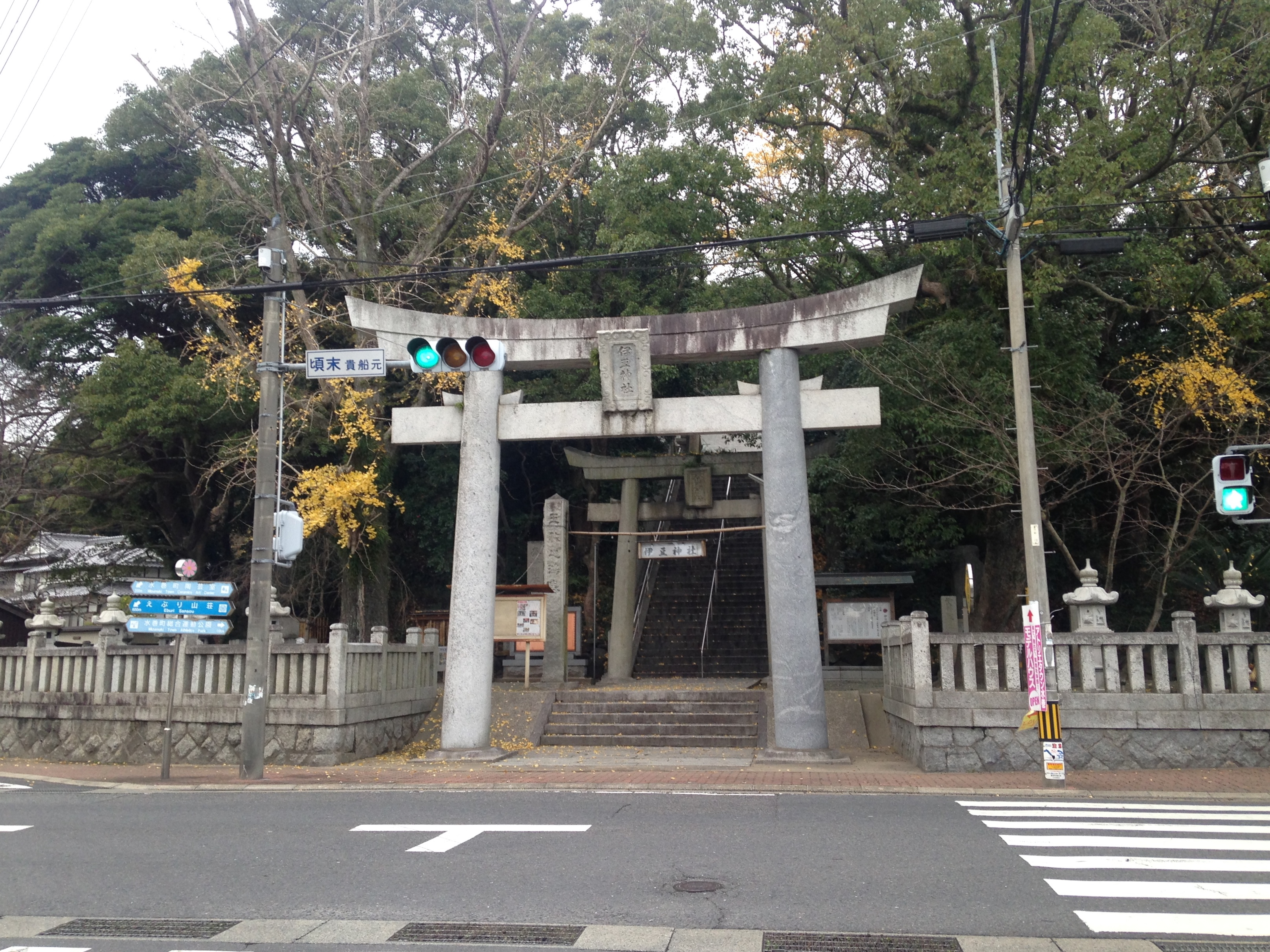 福岡県遠賀郡水巻町・伊豆神社の鳥居